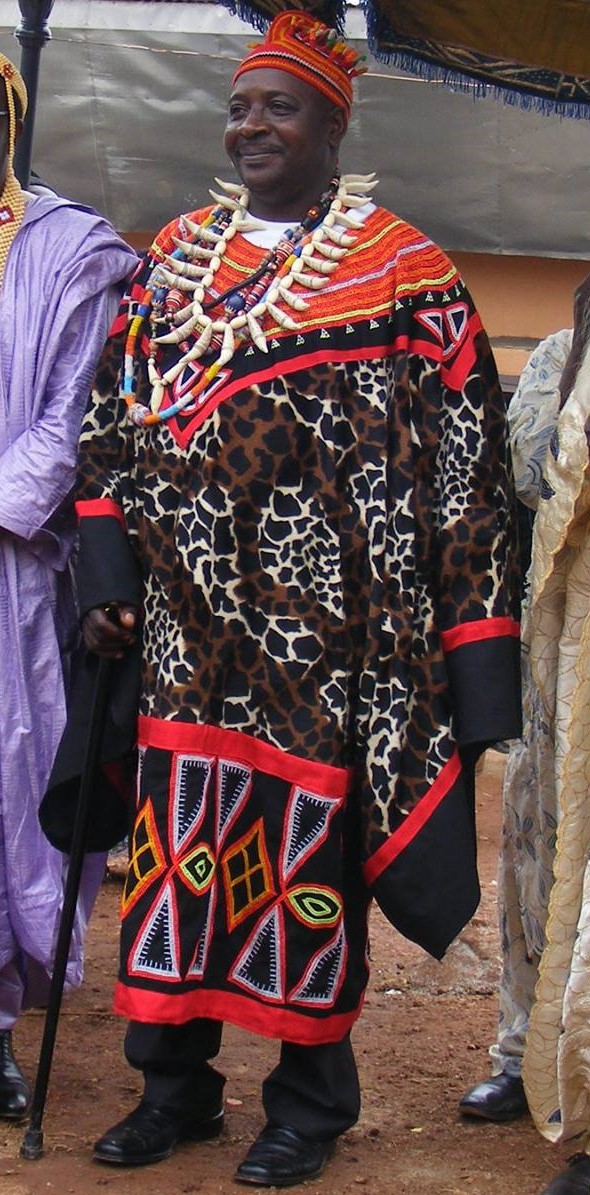 Noussi Charly Constant, 12ème Roi de la dynastie des rois Baloum en 2014 arborant une tenue traditionnelle des chefs Bamilékés